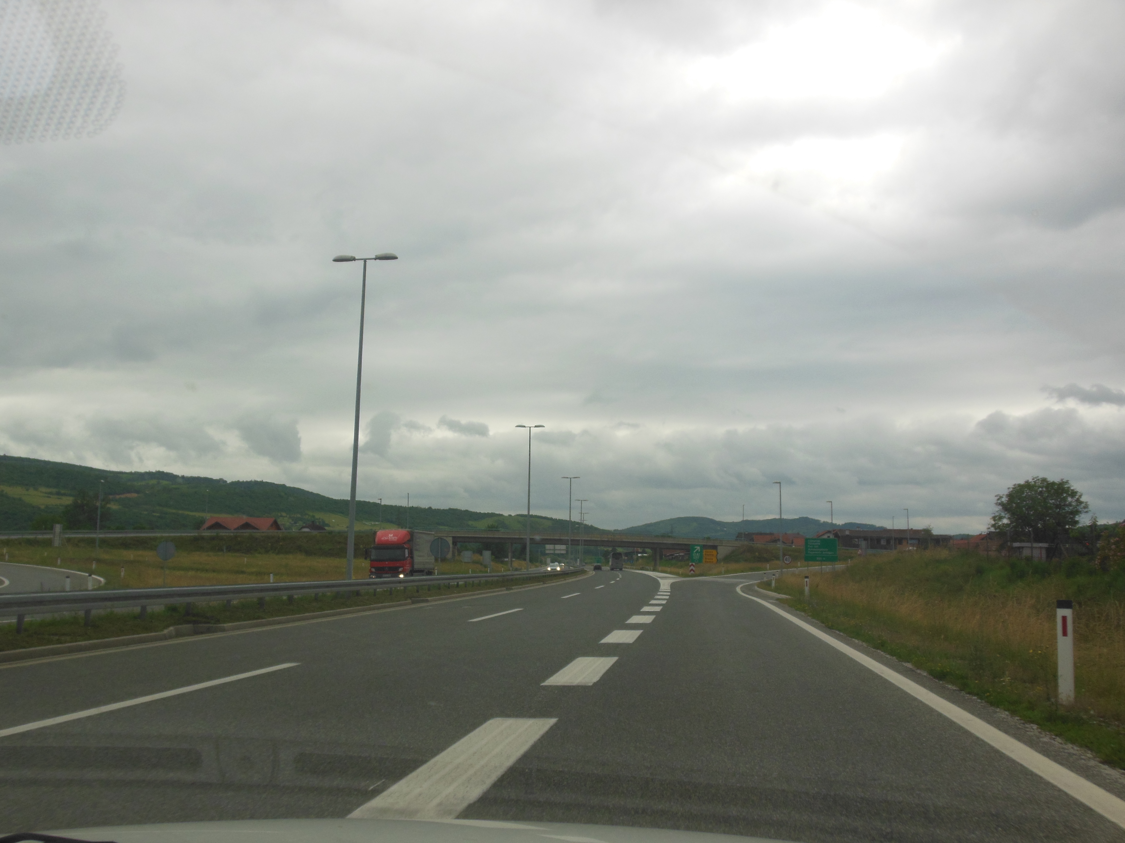 Bosnian A1